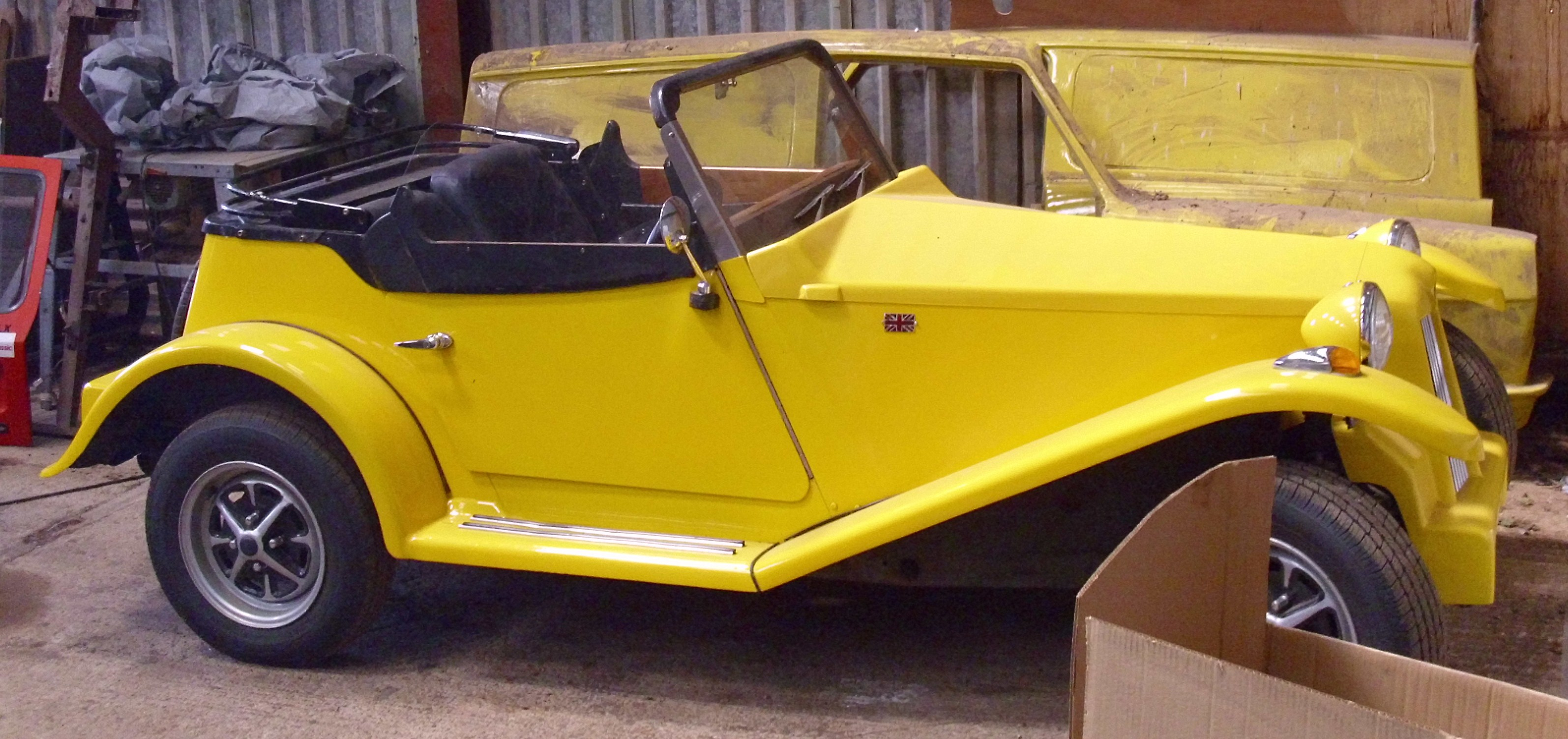 Tempest